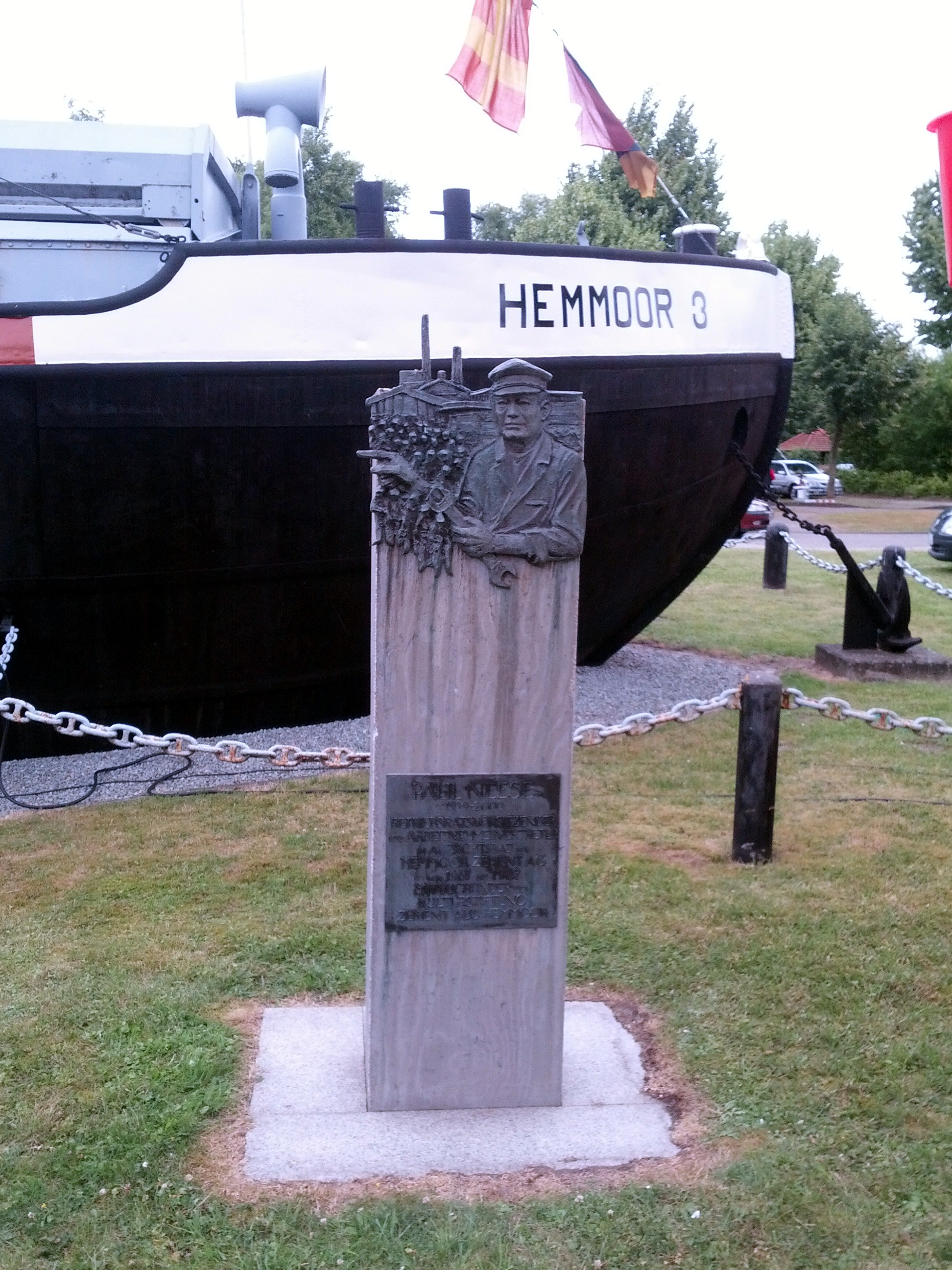 Steel för Paul Neese vör dat Zementmuseum Hemmoor